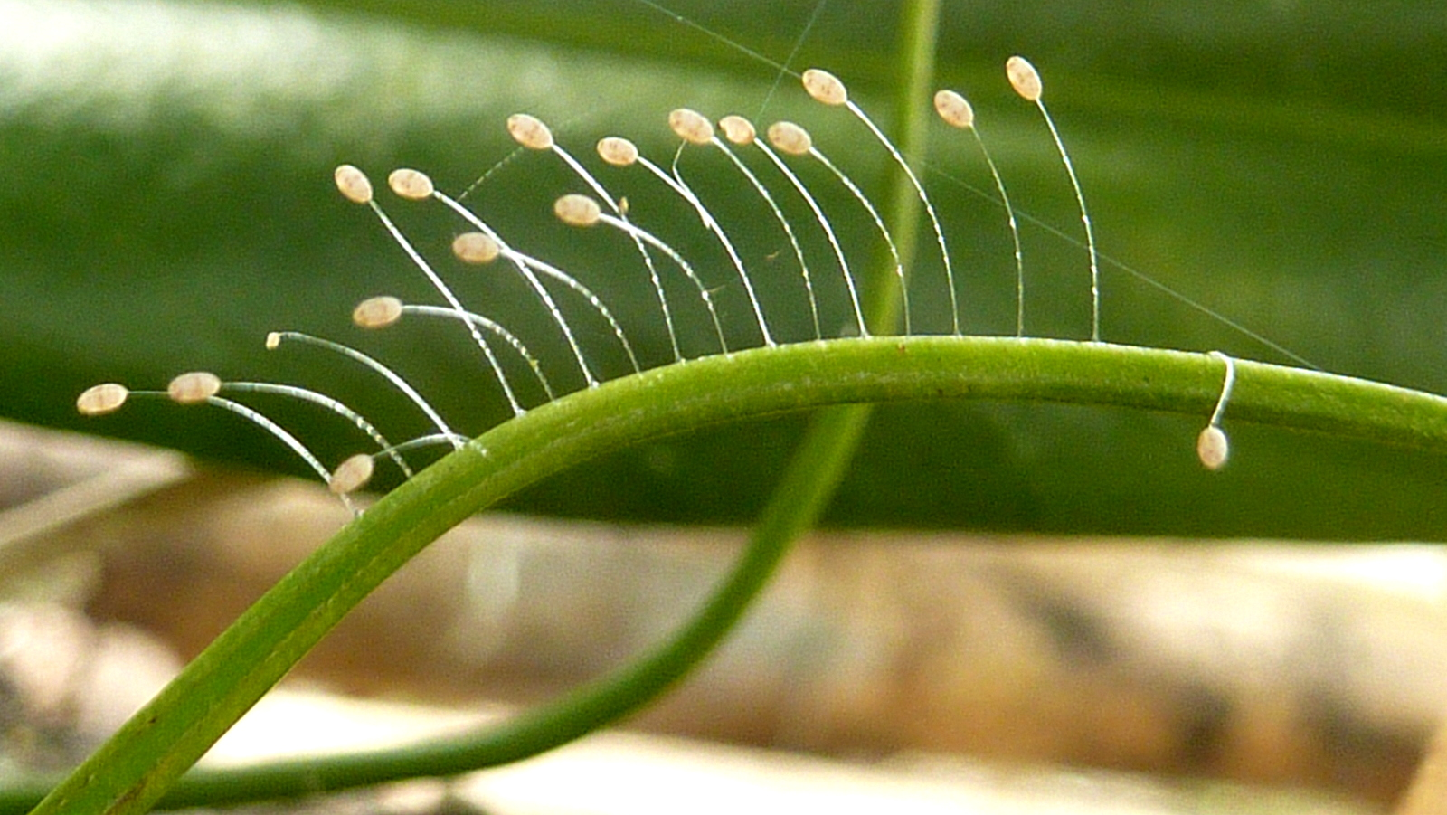 Eggs.